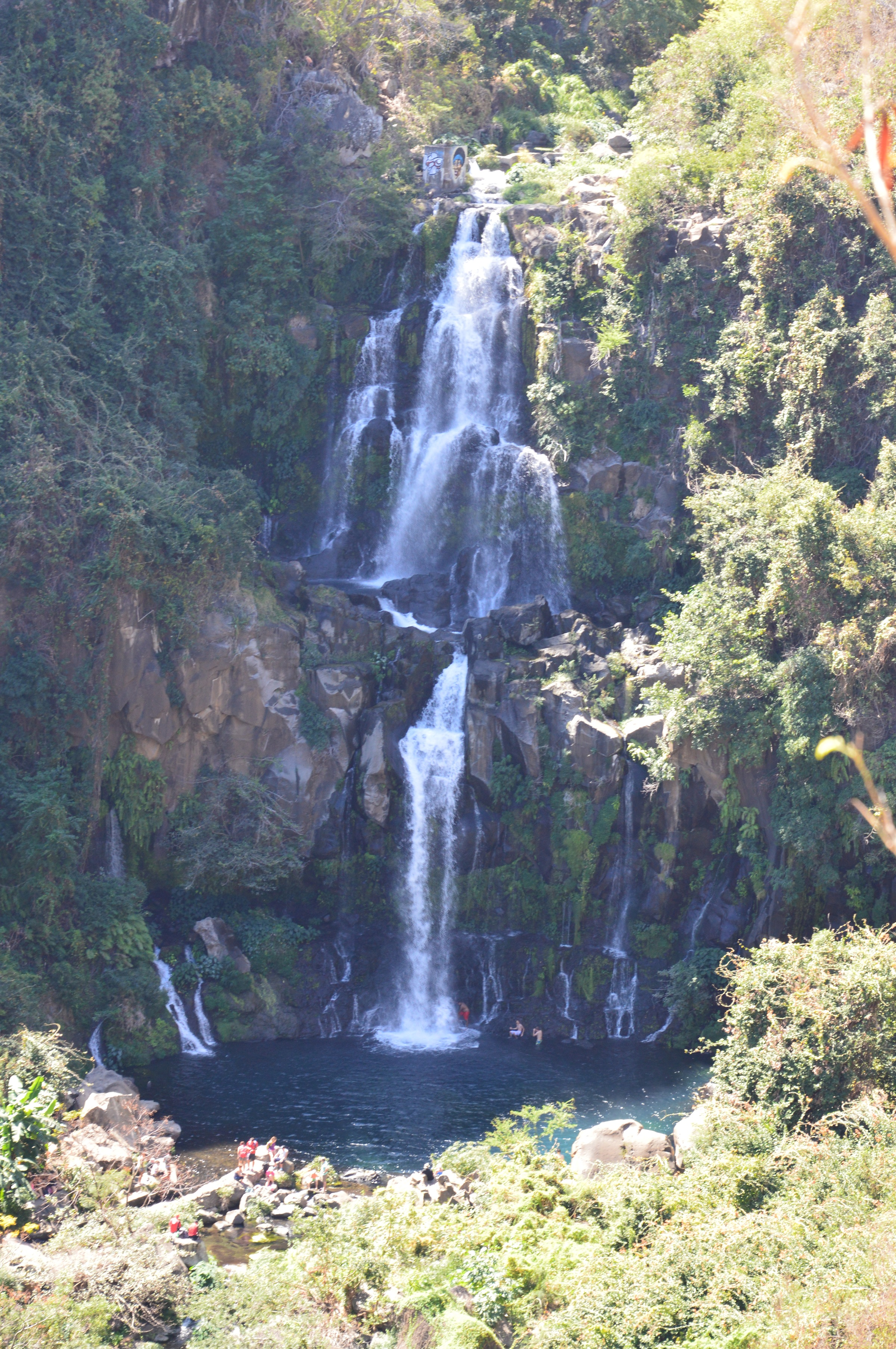 Une des trois cascades des bassins cormorans